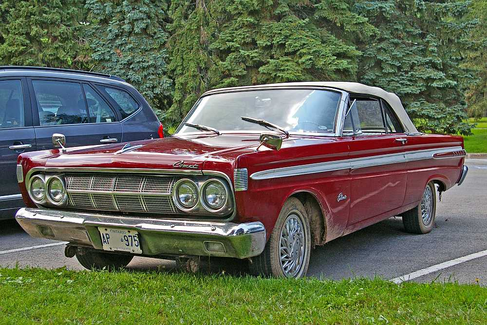 Cabrioversion des Mercury Comet 1964